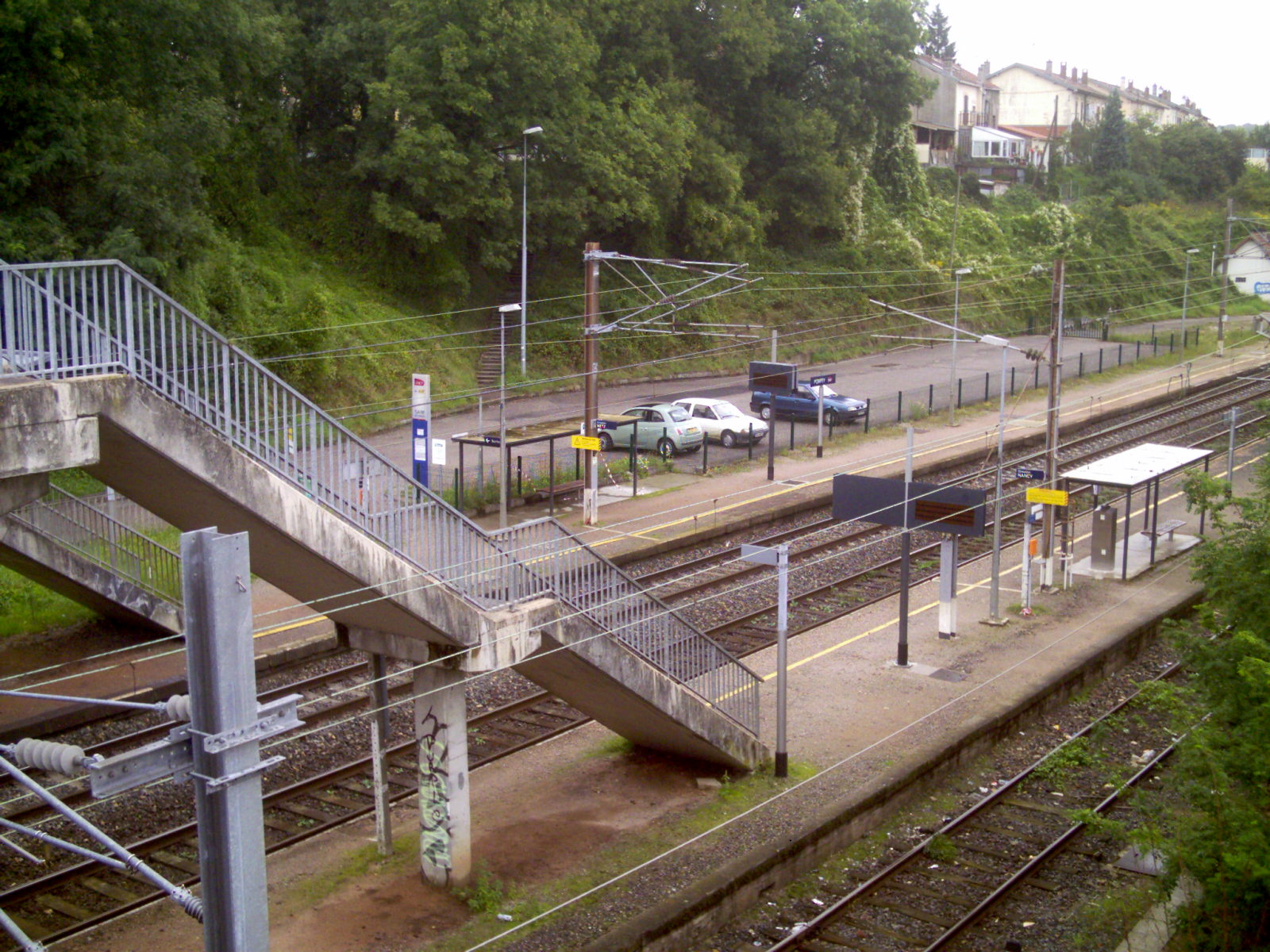 Arret SNCF de Pompey